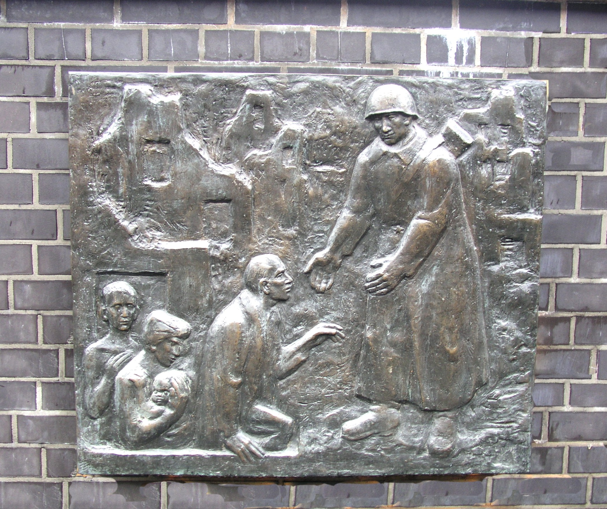 Gedenktafel (2) in der Schönhauser Allee, Berlin, von Günter Schütz, DDR 1985/86